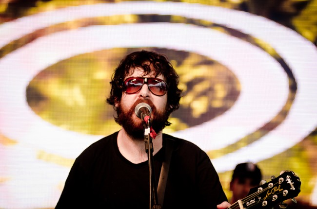 Juli Manzi durante o festival Ufsctock 2011.